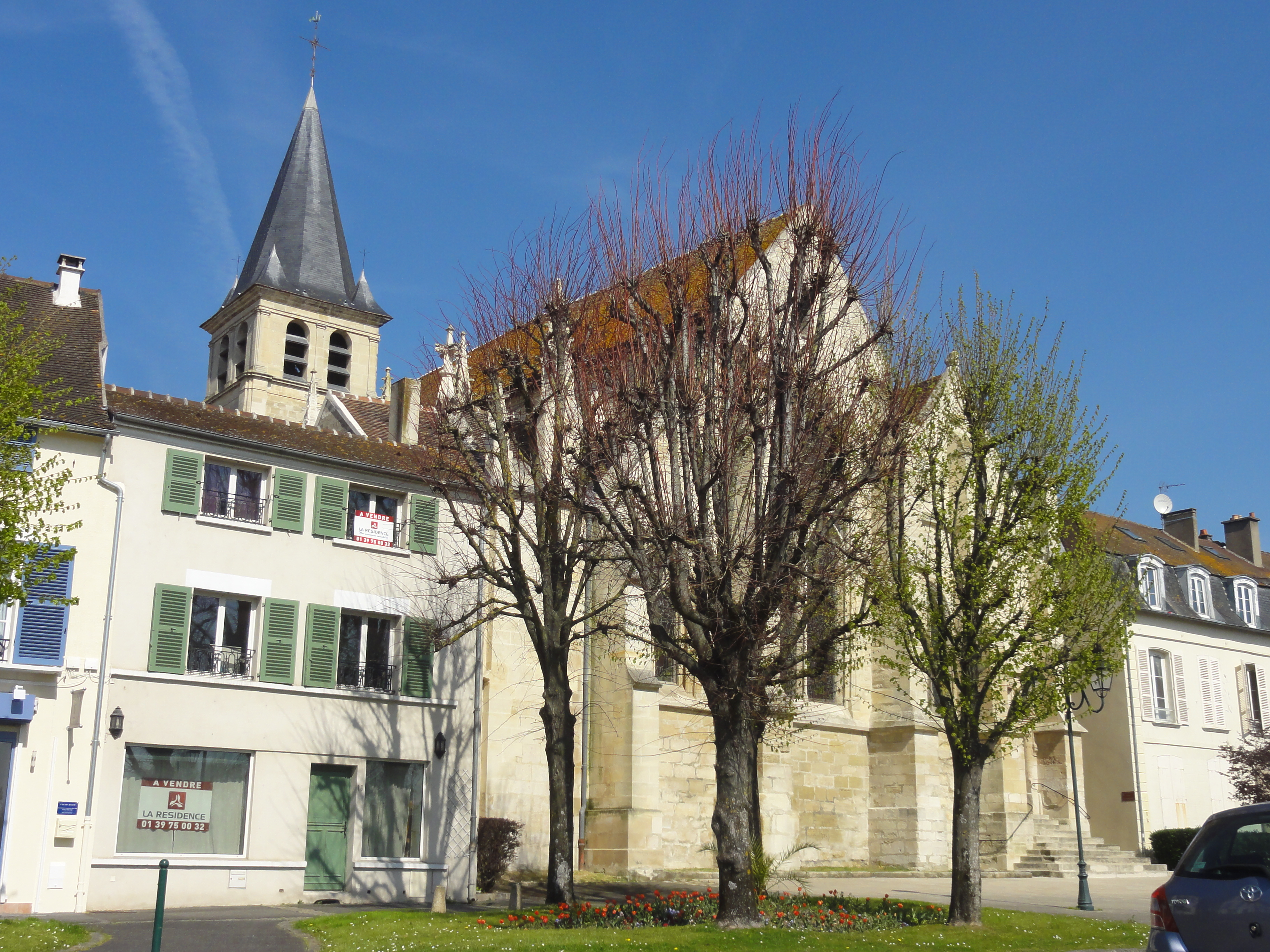 Église Saint-Germain d'Andrésy - voir titre.